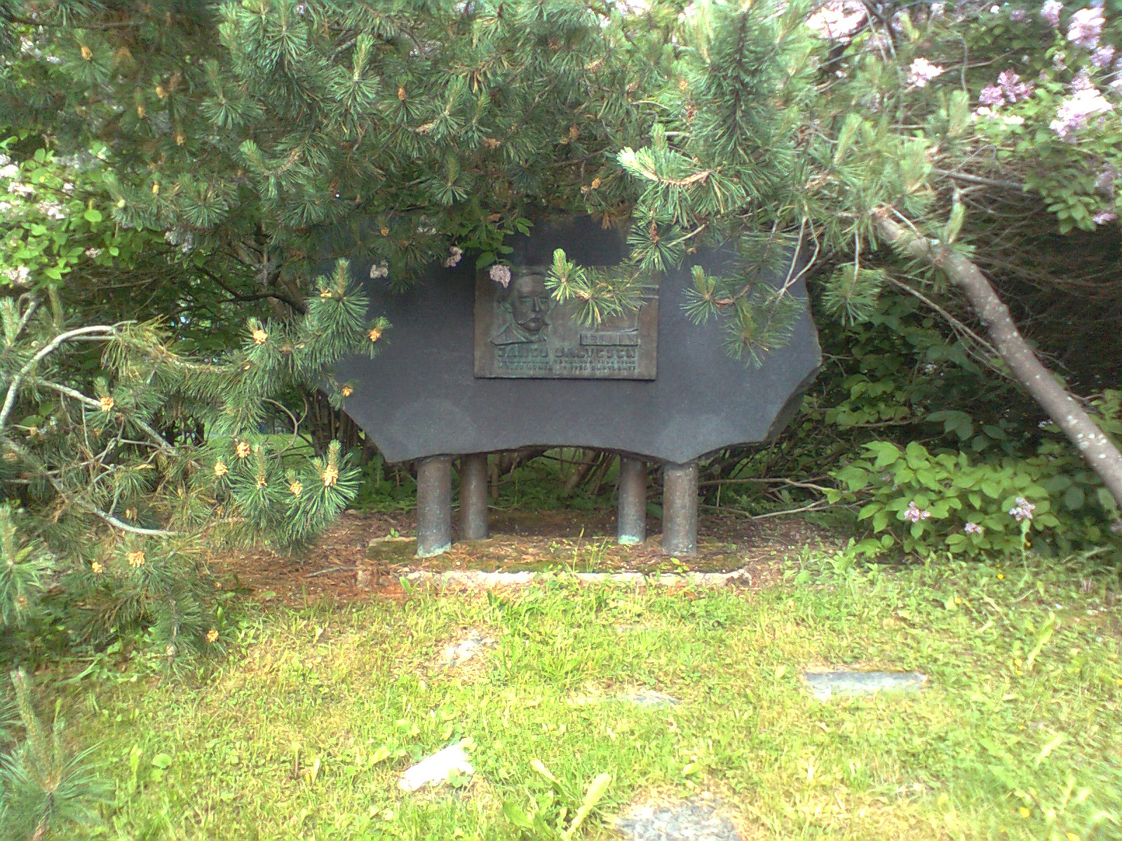 James Salvesenin muistomerkki Vaajakosken Naissaaressa